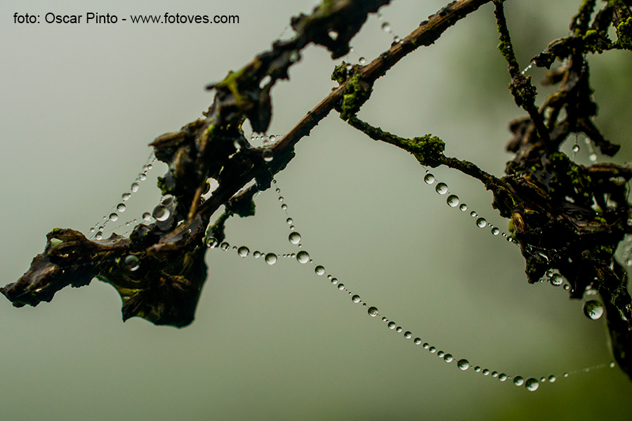 Gotas de agua por la humedad